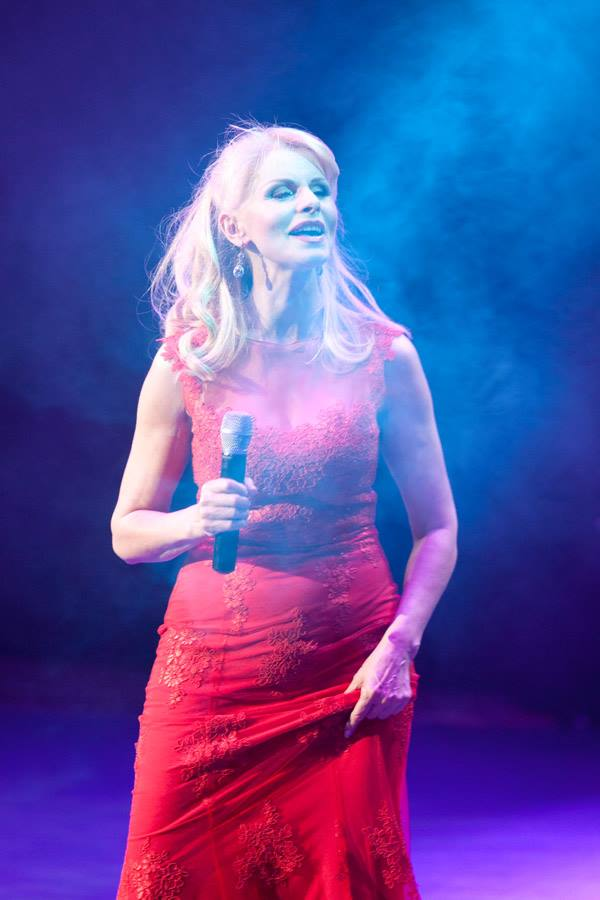 Anastasia Lazariuc în concert, 8 mai 2014